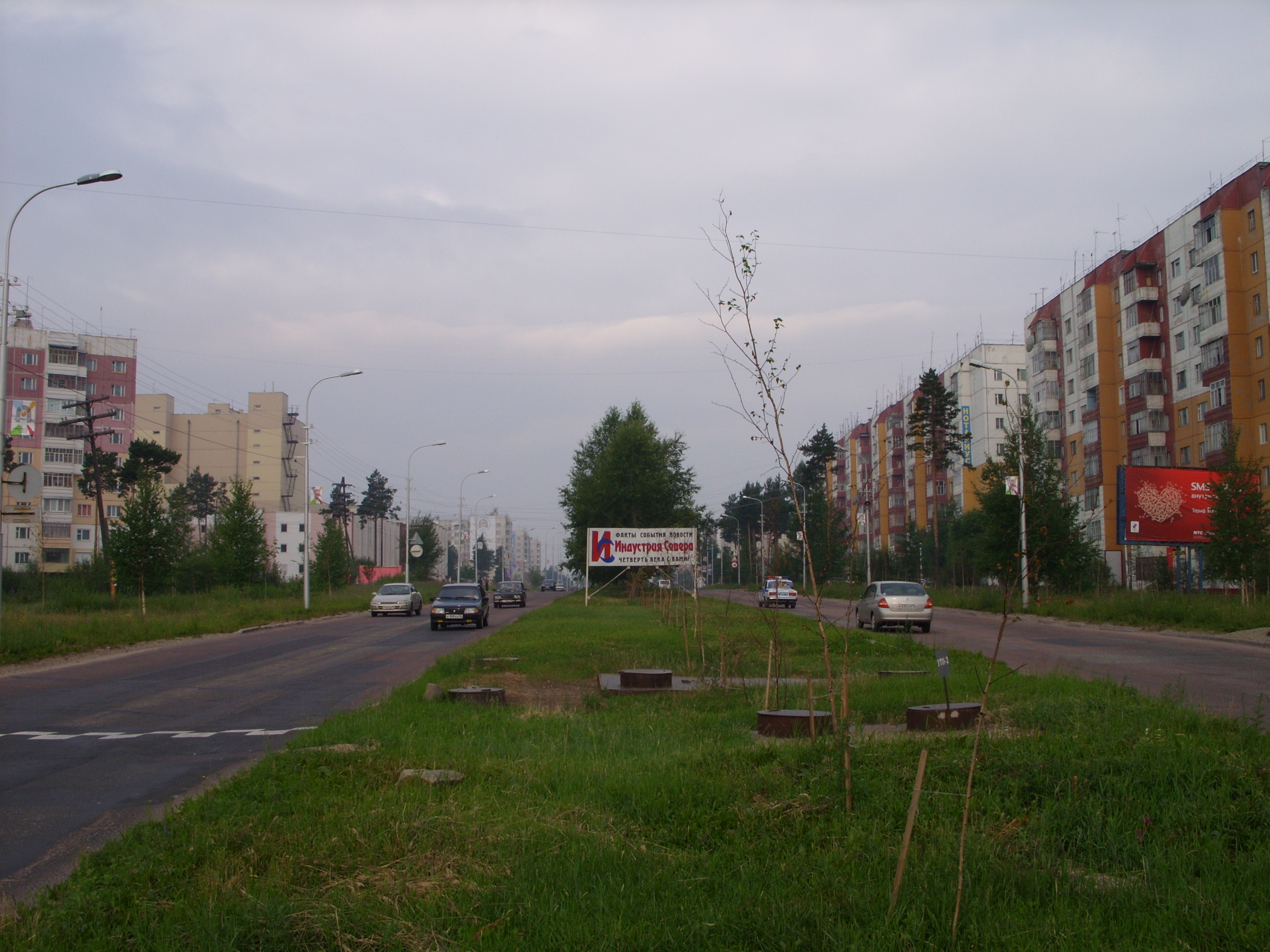 снимки июля 2008 г.